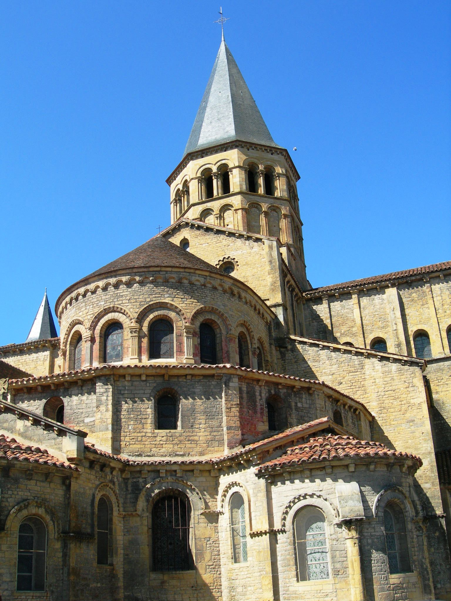 Paray-le-Monial, les apsides)